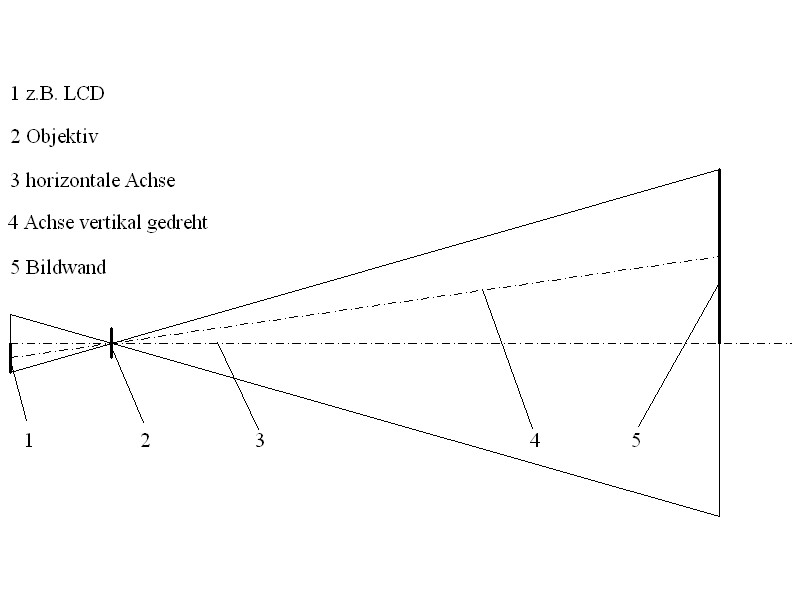 Video Projektor, lens shift, Objektiv wird parallel zur Bildebene verschoben, Strahlengang der Beleuchtung